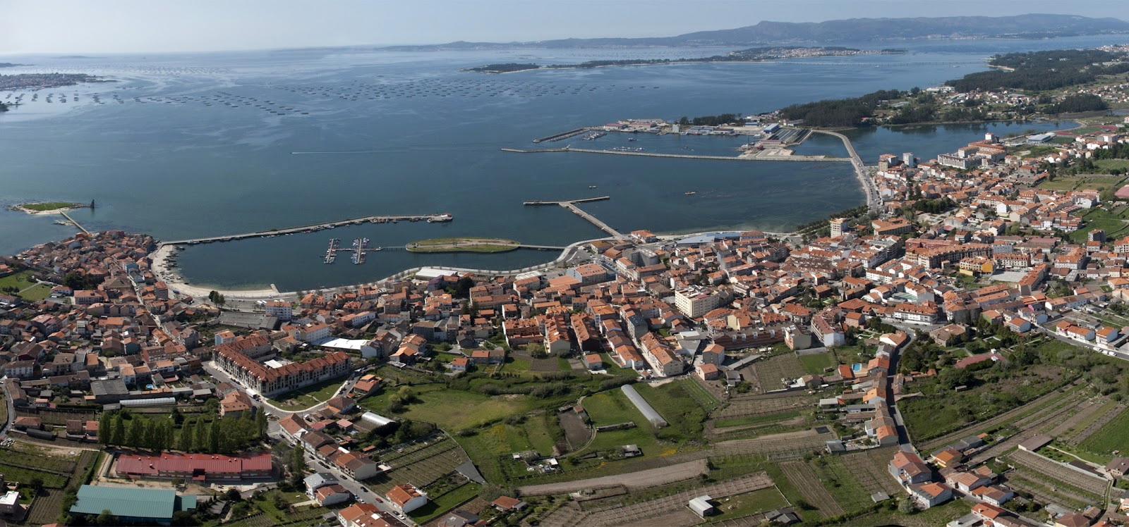 Vista aérea de Cambados